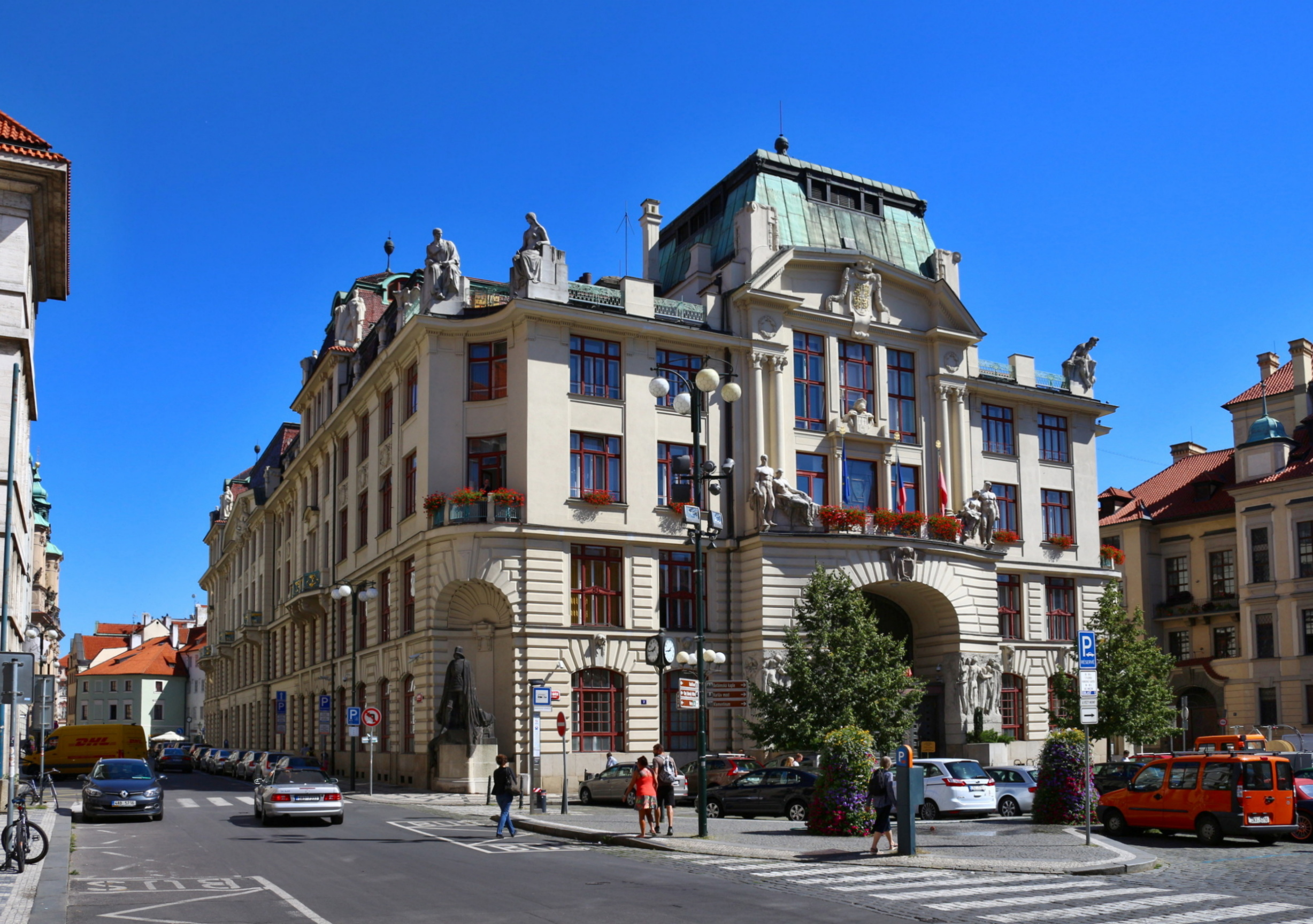 Magistrát hl. m. Prahy